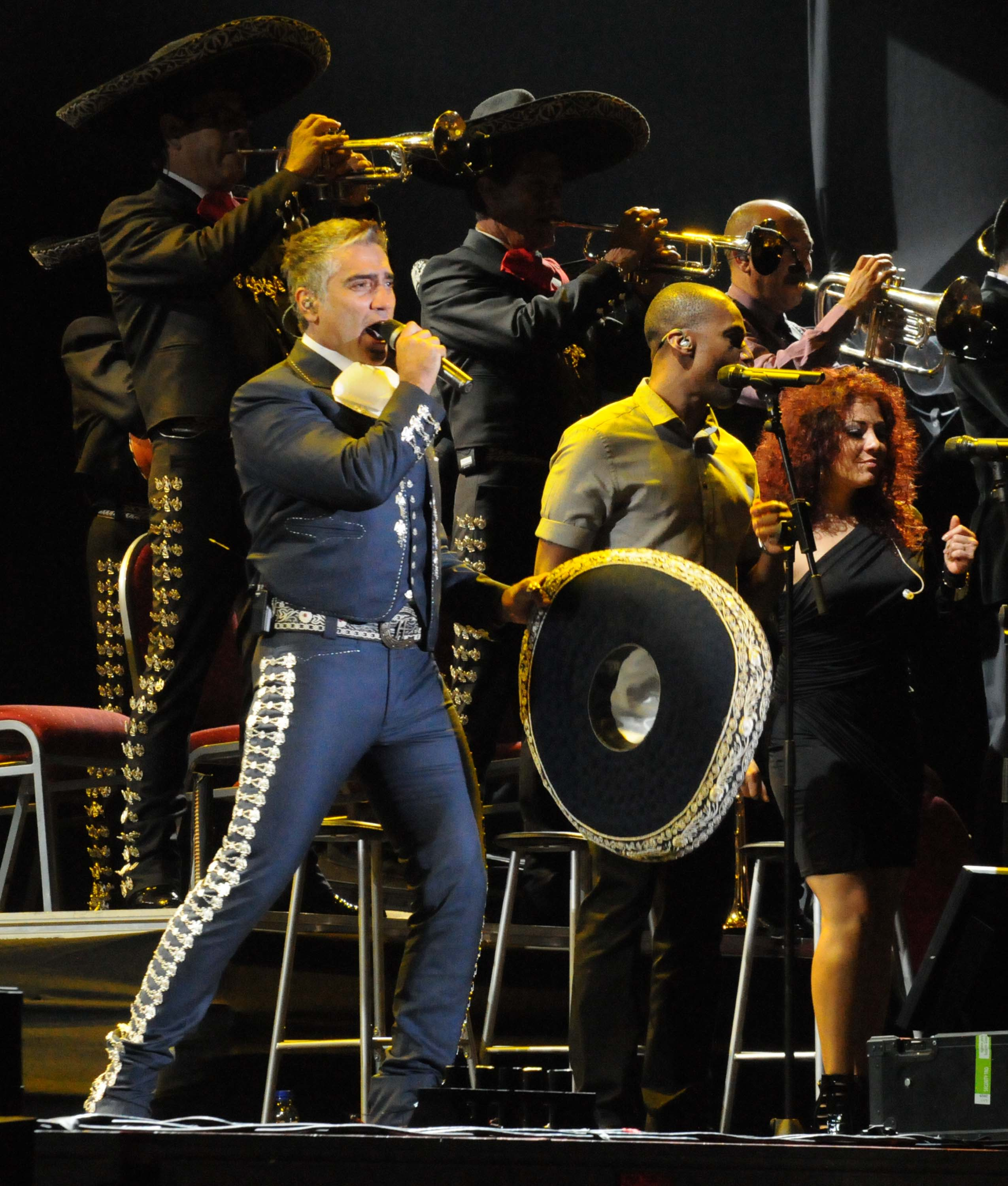 Fotografía gentileza de Patricio González.